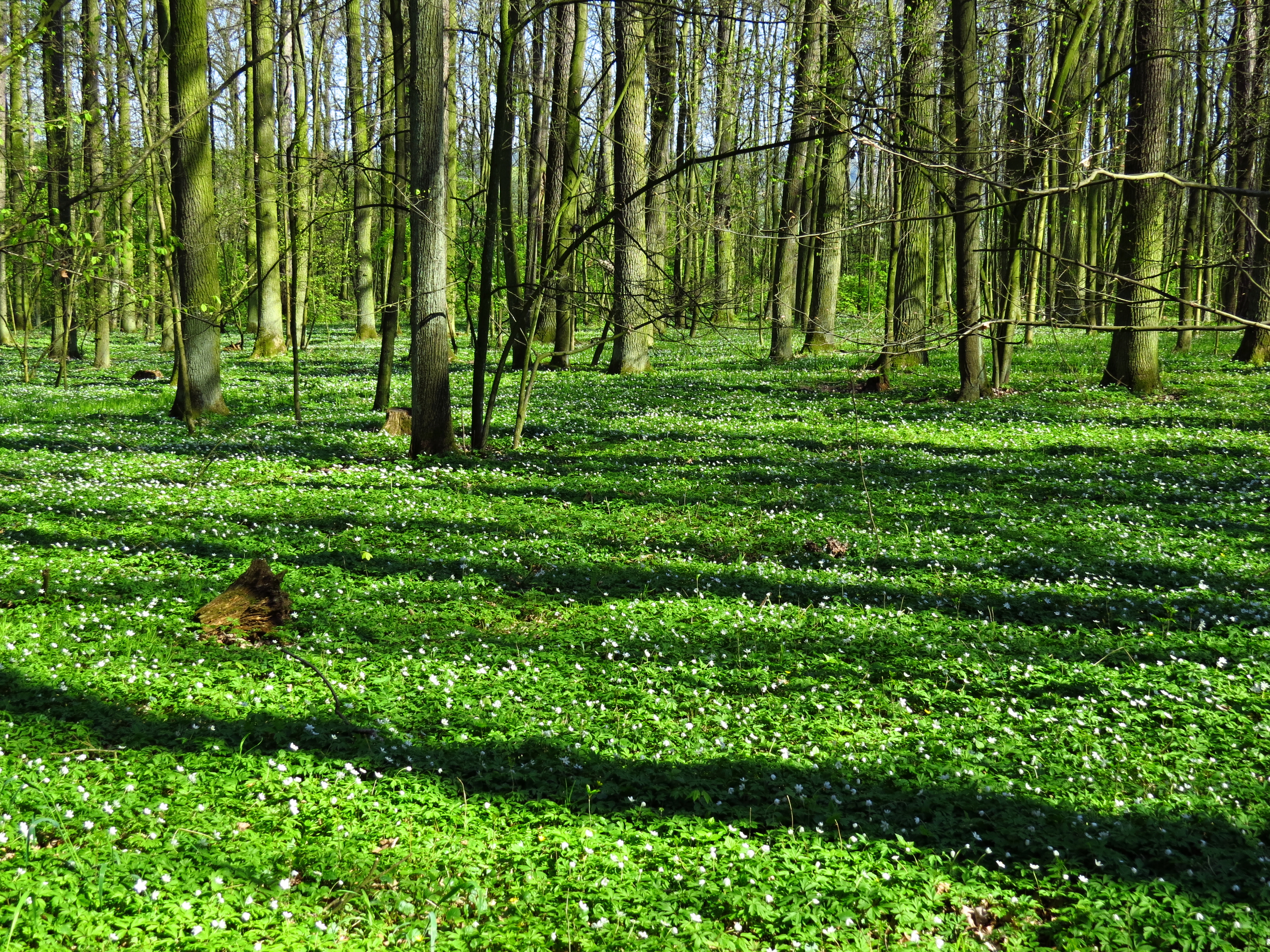 Jarní aspekt v rezervaci a hercynské dubohabřiny